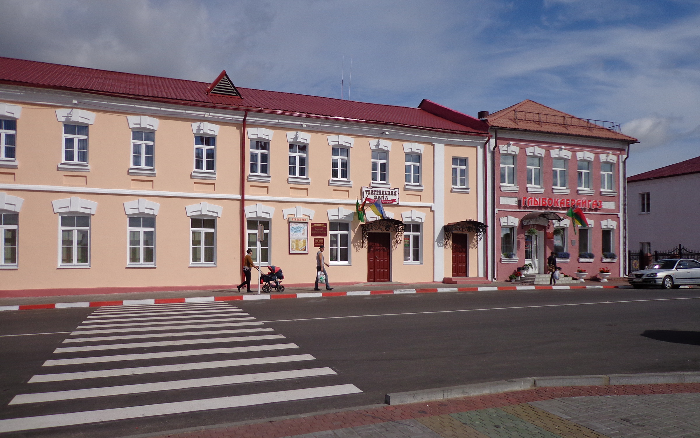 GLUBOKOE. Theatre Hall / ГЛЫБОКАЕ. Тэатральная зала.